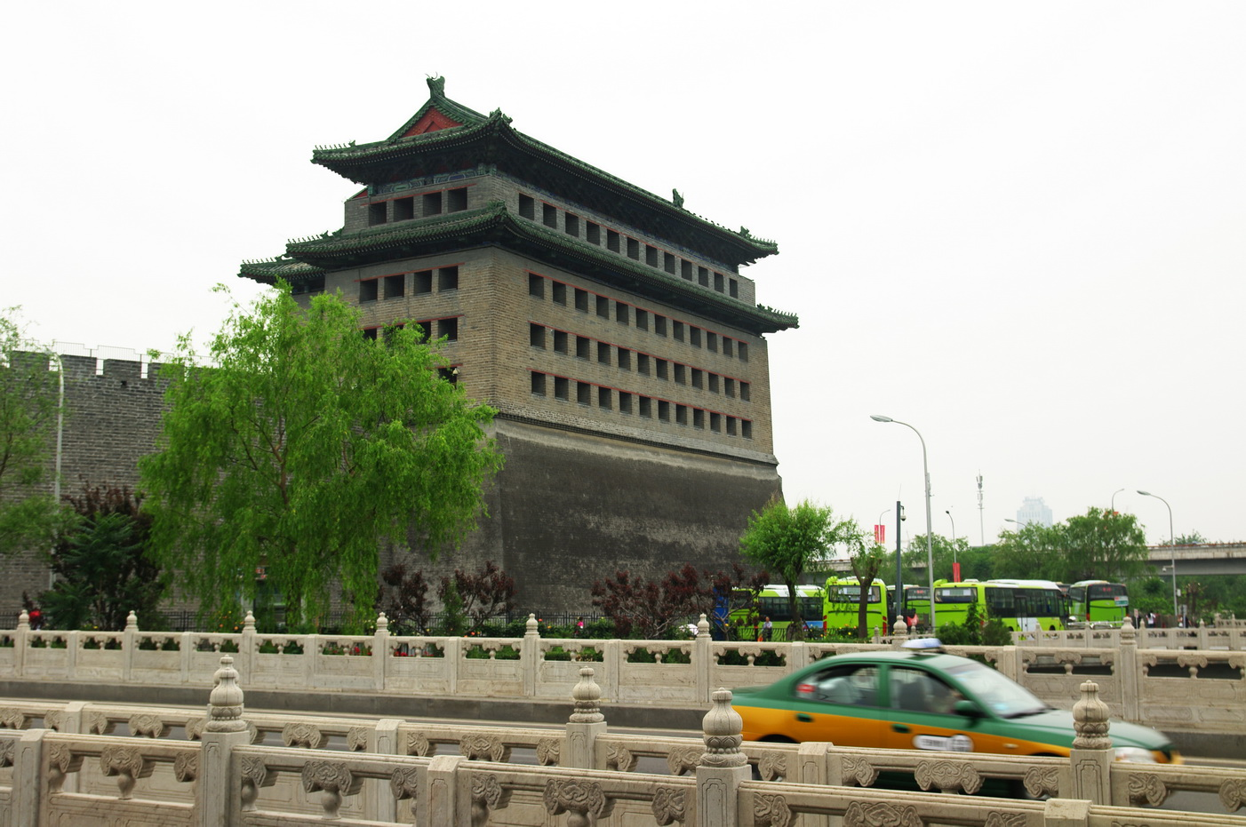 Deshengmen-Stadttor, Peking